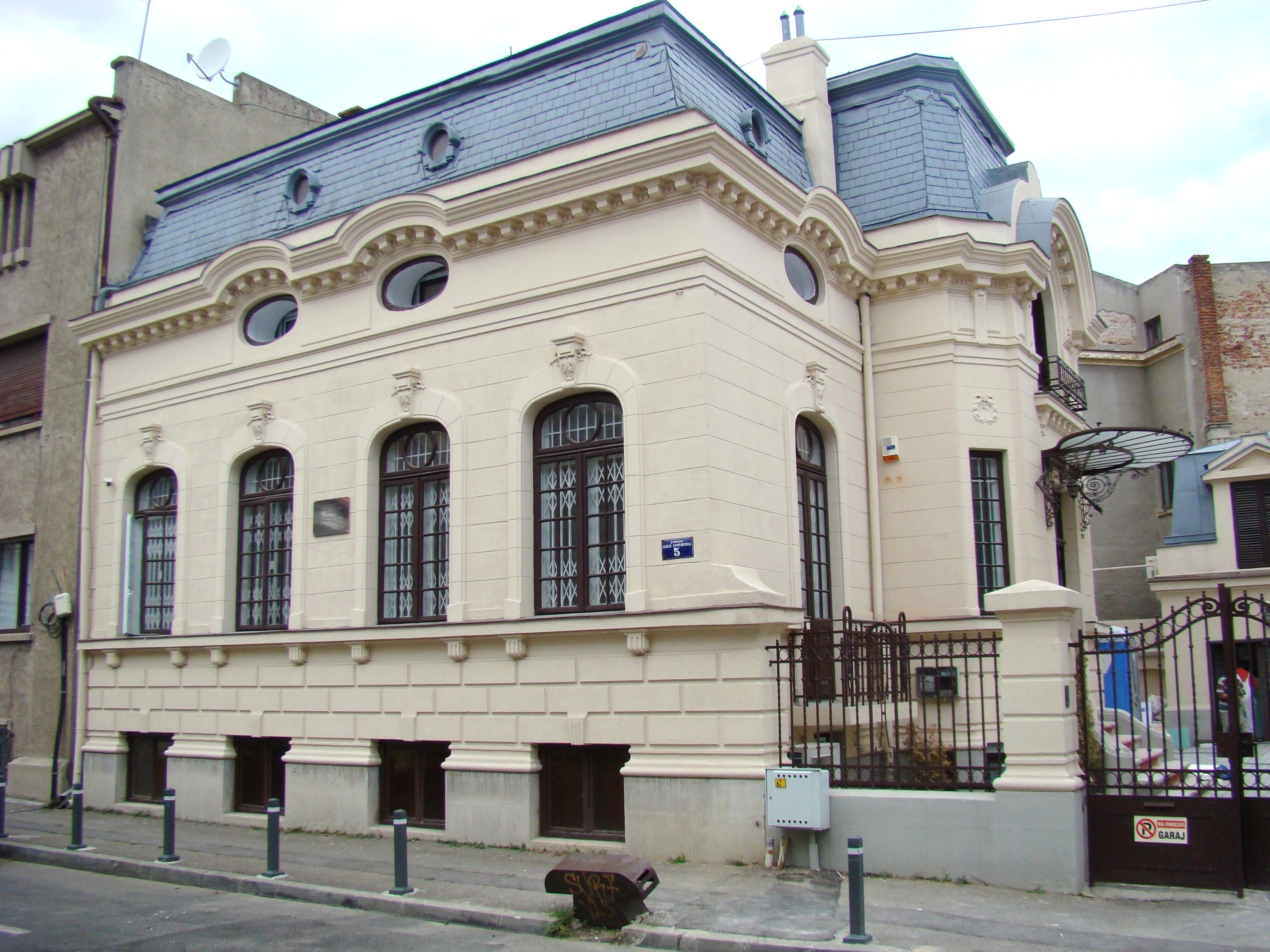 Clădire monument istoric, str. Duiliu Zamfirescu, nr.5